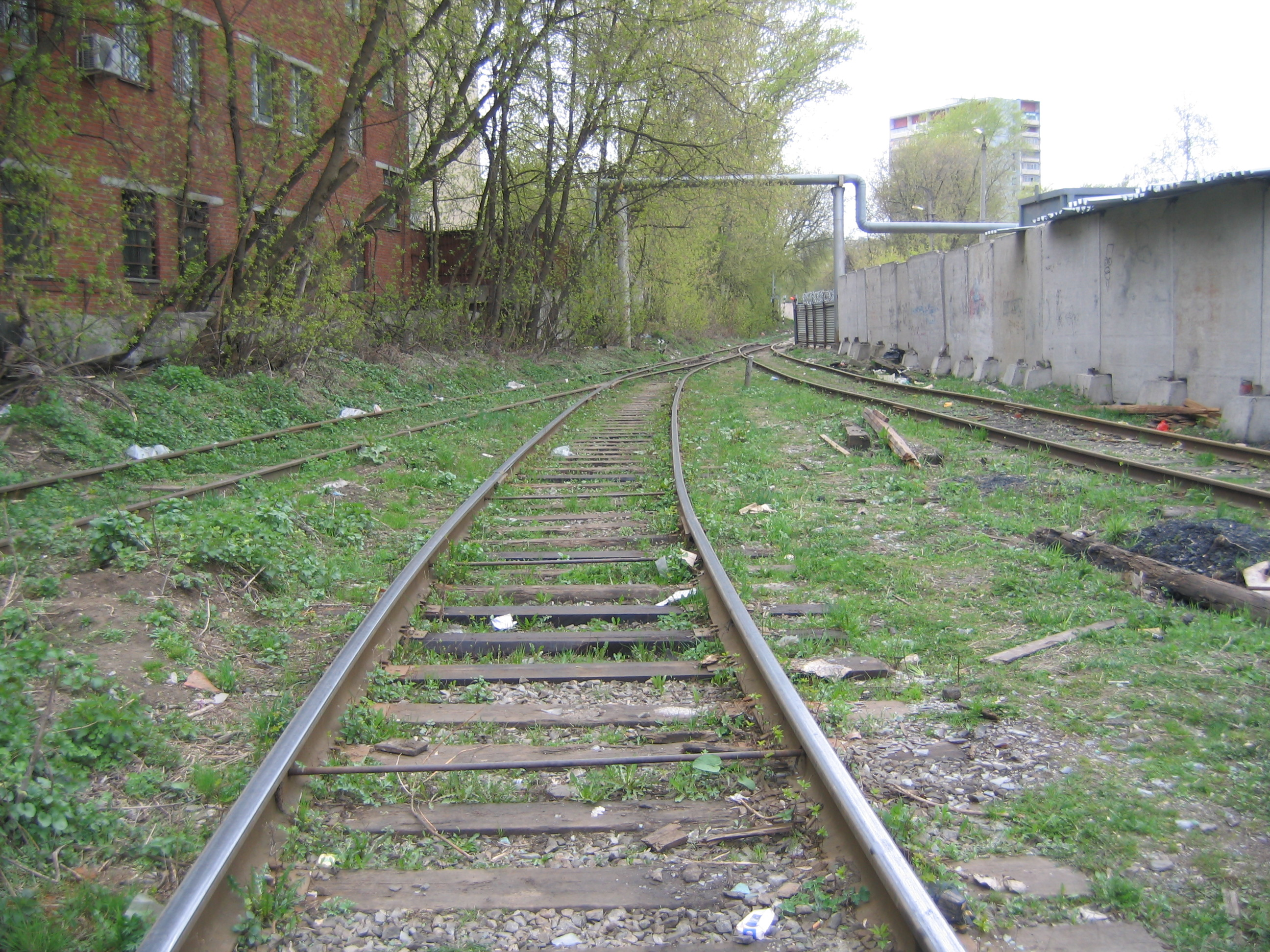 Elektrozavodskaya railvay line in Moscow, Russia